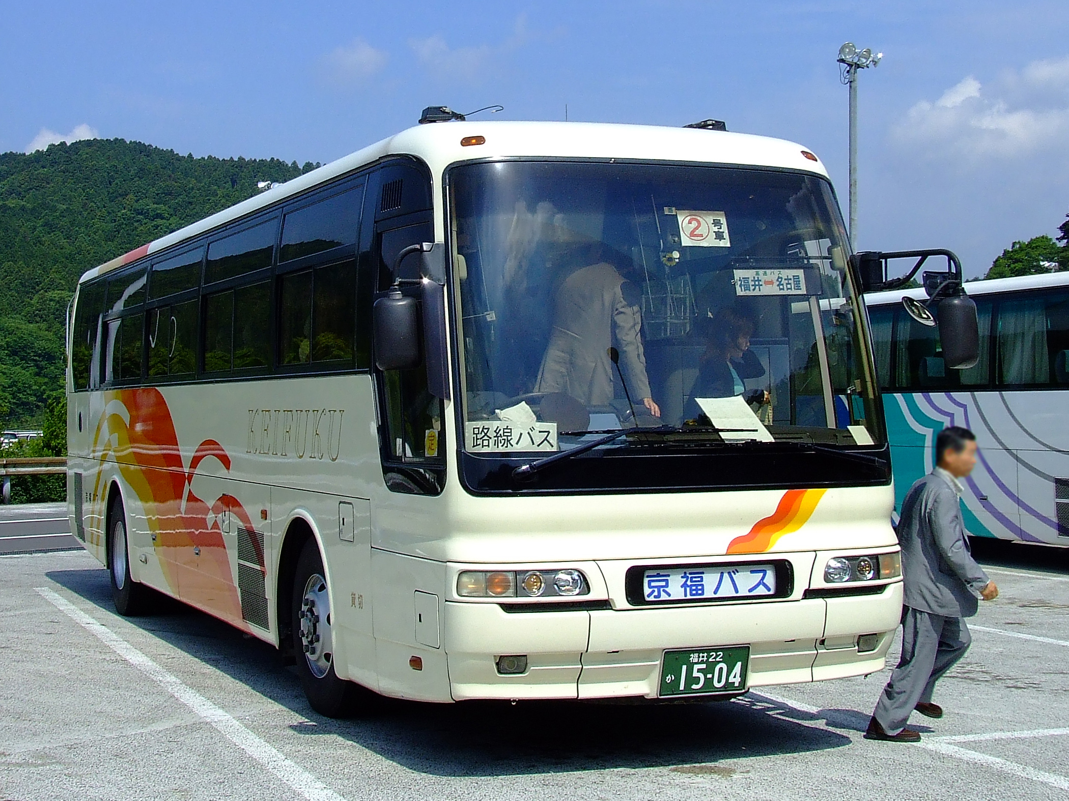 京福バスの高速バス「北陸道特急バス（福井線）」 賤ヶ岳サービスエリアにて